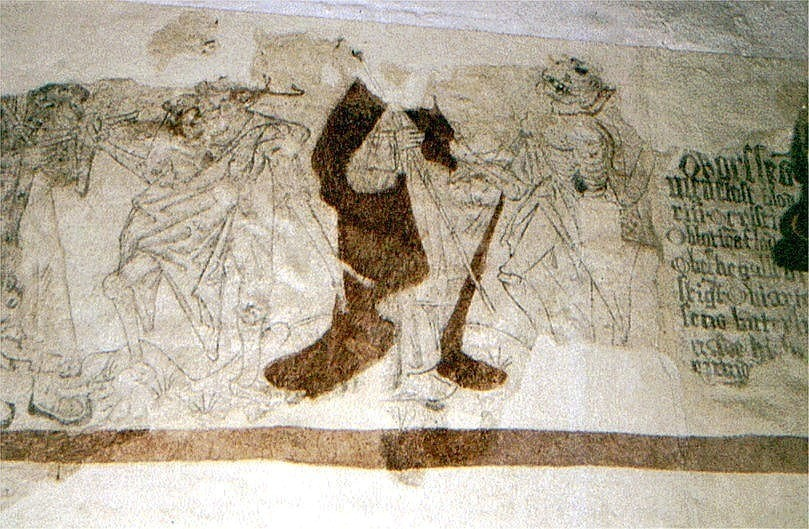 Egtved Kirke i Danmark. Skibets nordvæg, Dødedans